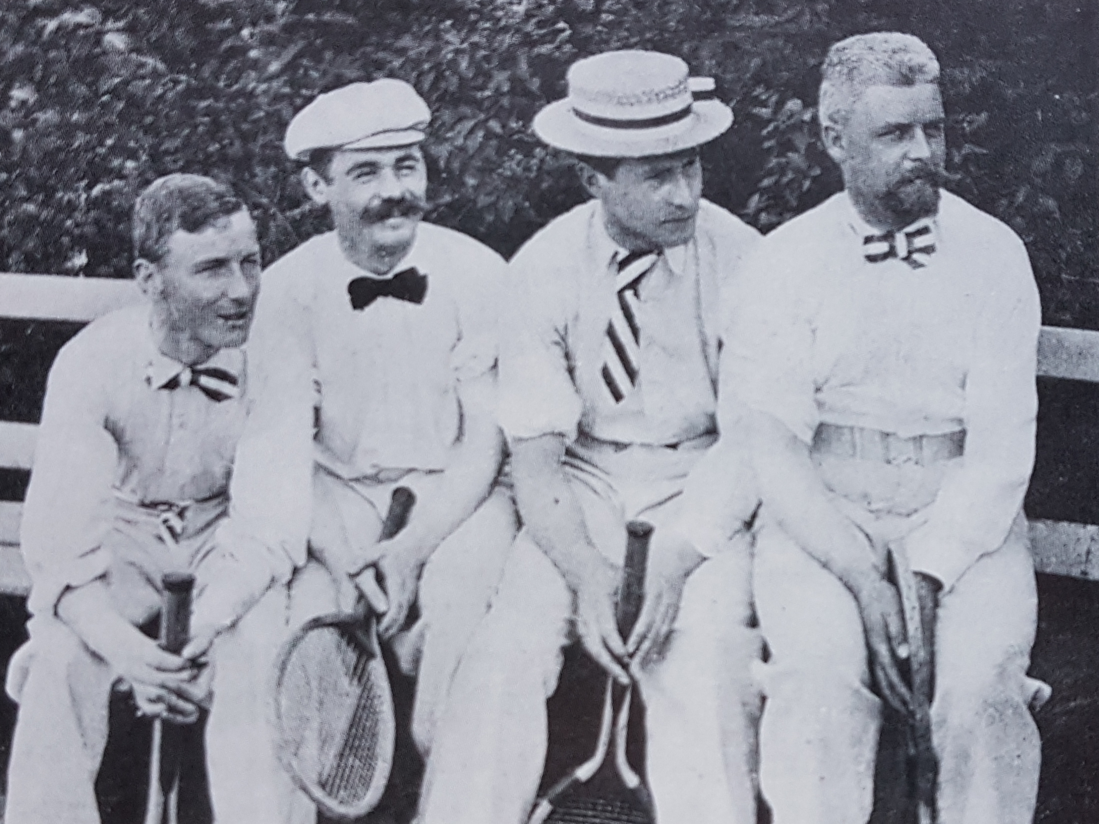 Kjøbenhavns Boldklub 2 från höger Folmer Hansen